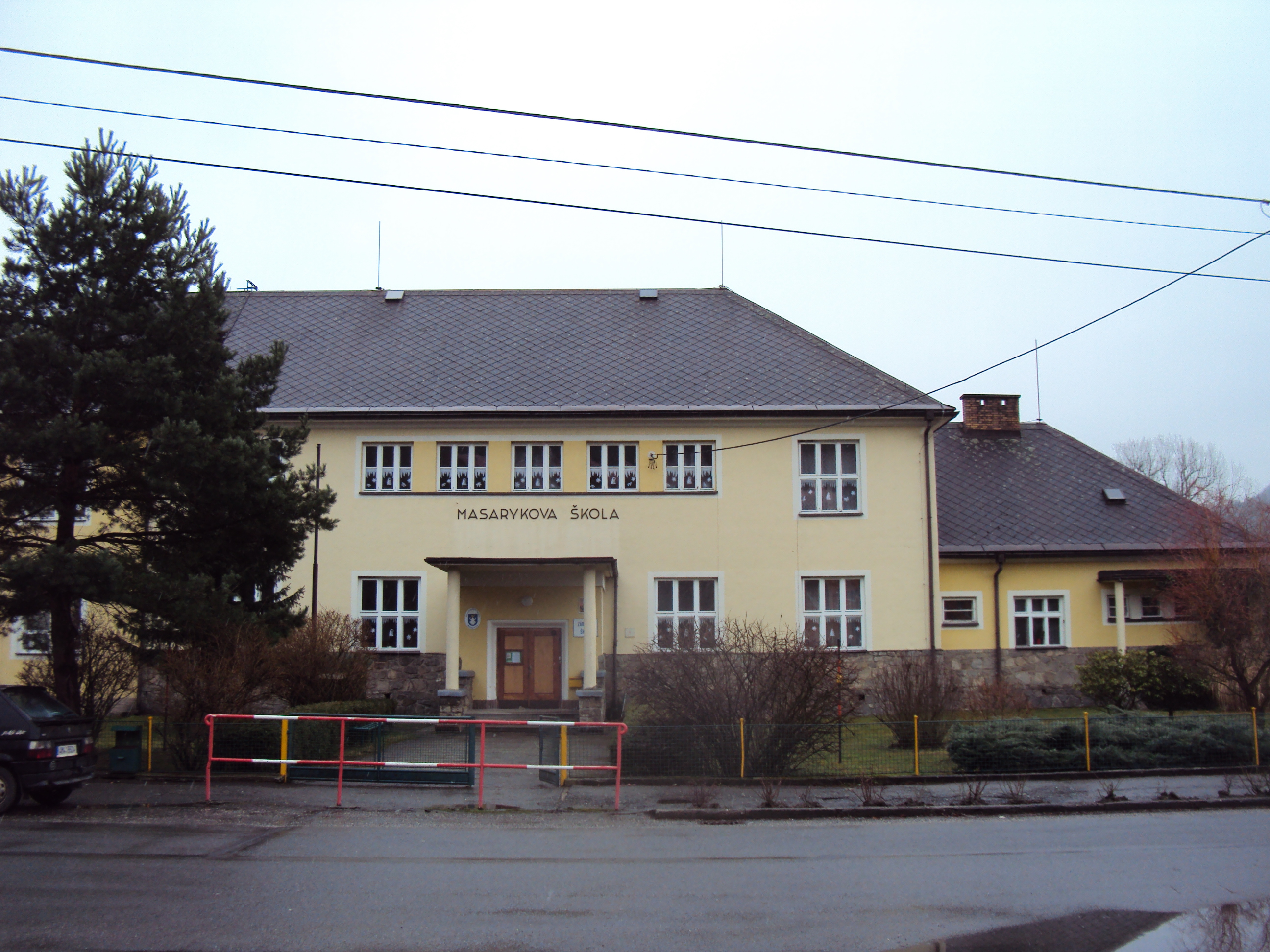 Bohutín škola